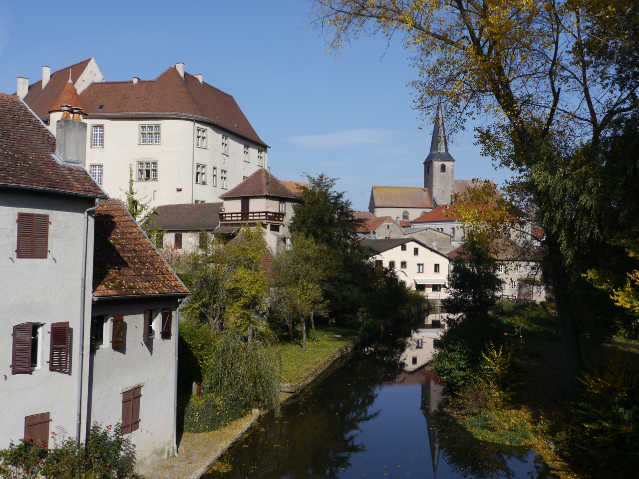 Vue du Château de Fénétrange, dominant la Sarre